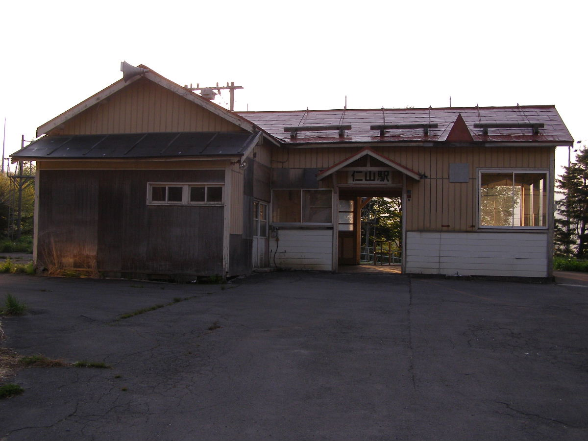 函館本線・仁山駅